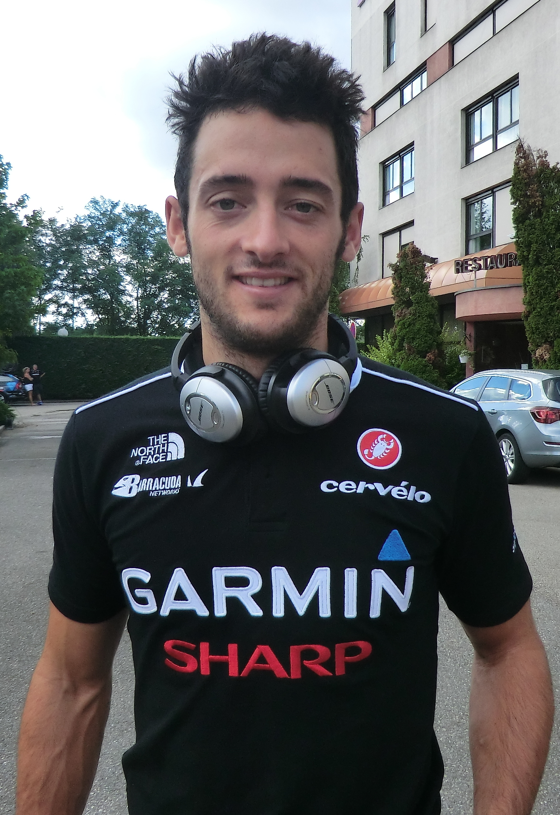 Coureur/directeur sportif au départ de l'hôtel : étape 1 du Tour de l'Ain 2013.